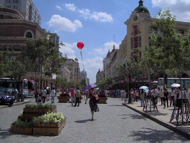 哈尔滨中央大街街景